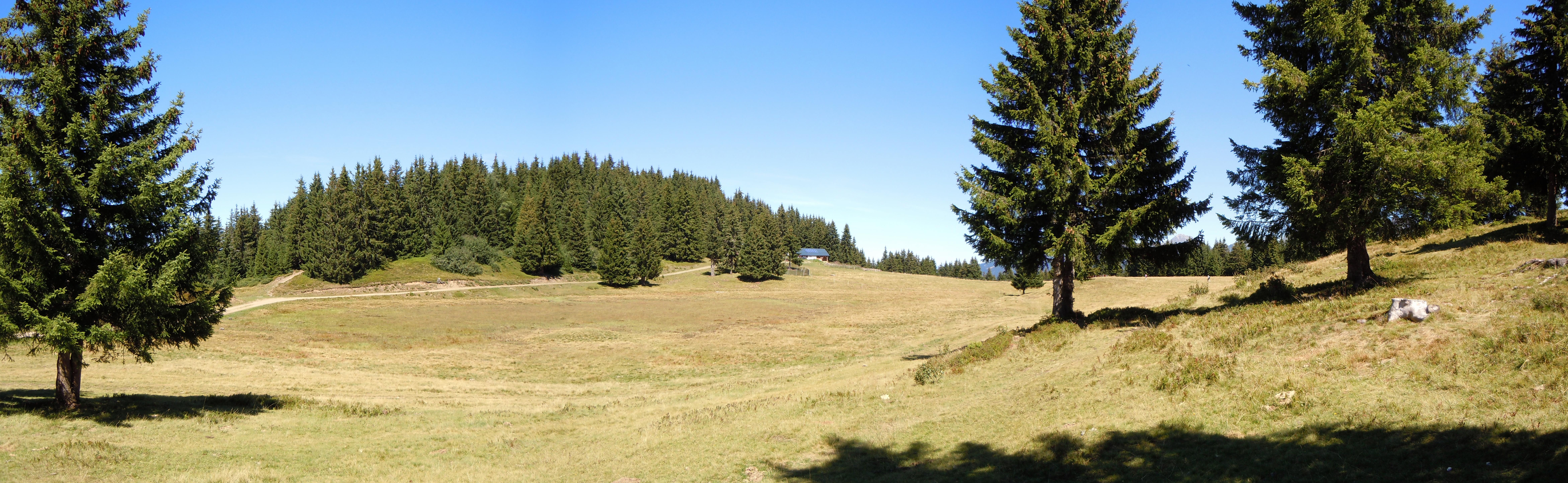 Crêt du Poulet - Chaîne de Belledonne - Isère - France